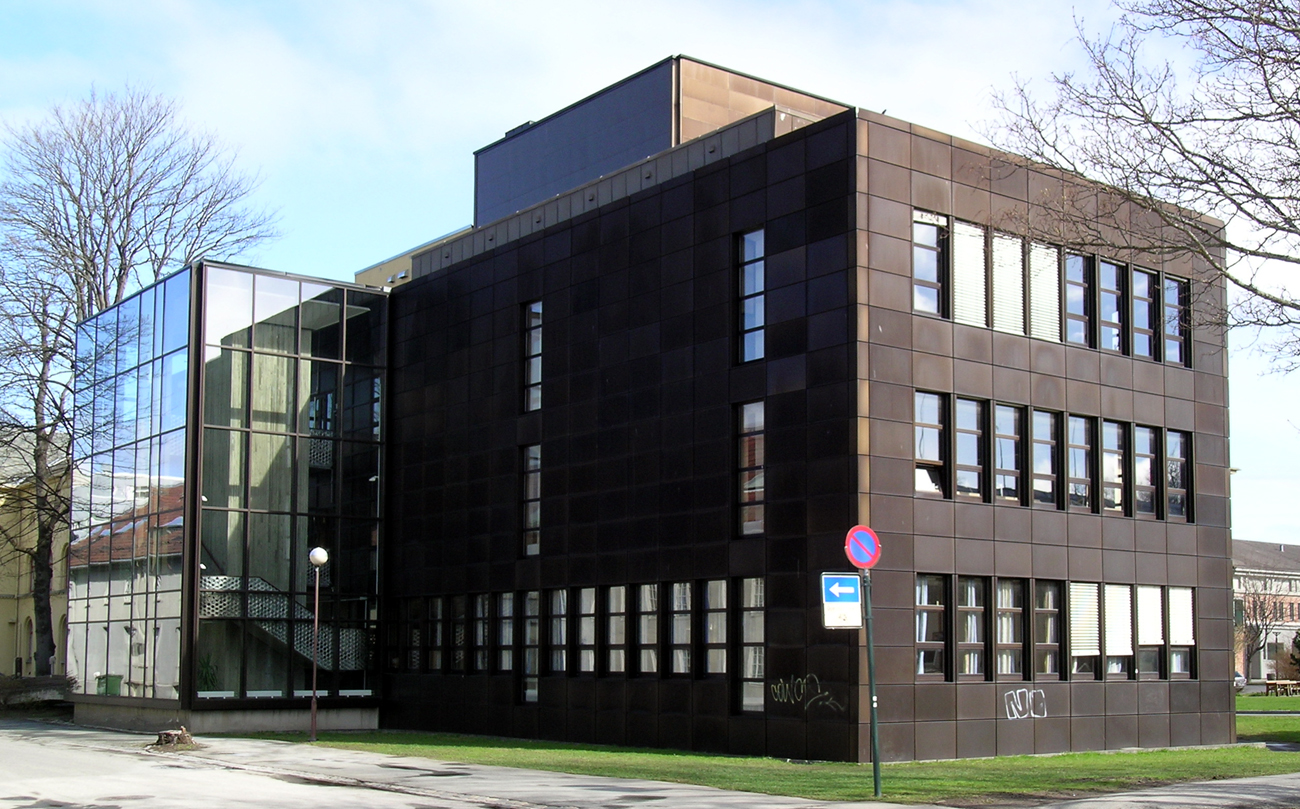 Universitetsbiblioteket i Trondheim (Gunnerusbiblioteket), Erling skakkes gate 47b. Bygd 1974. Arkitekter: Anne og Einar Myklebust.